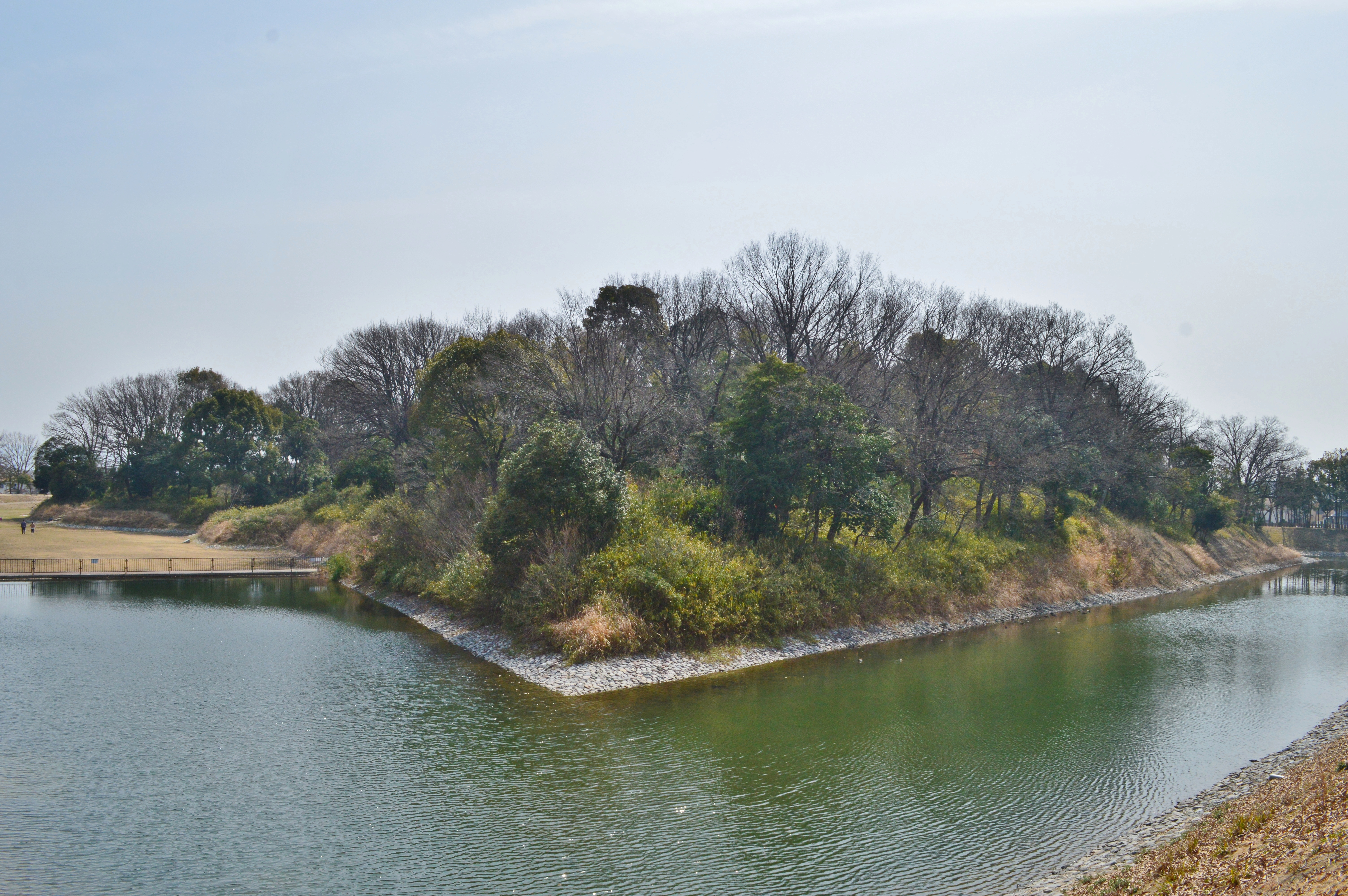 今城塚古墳 墳丘全景